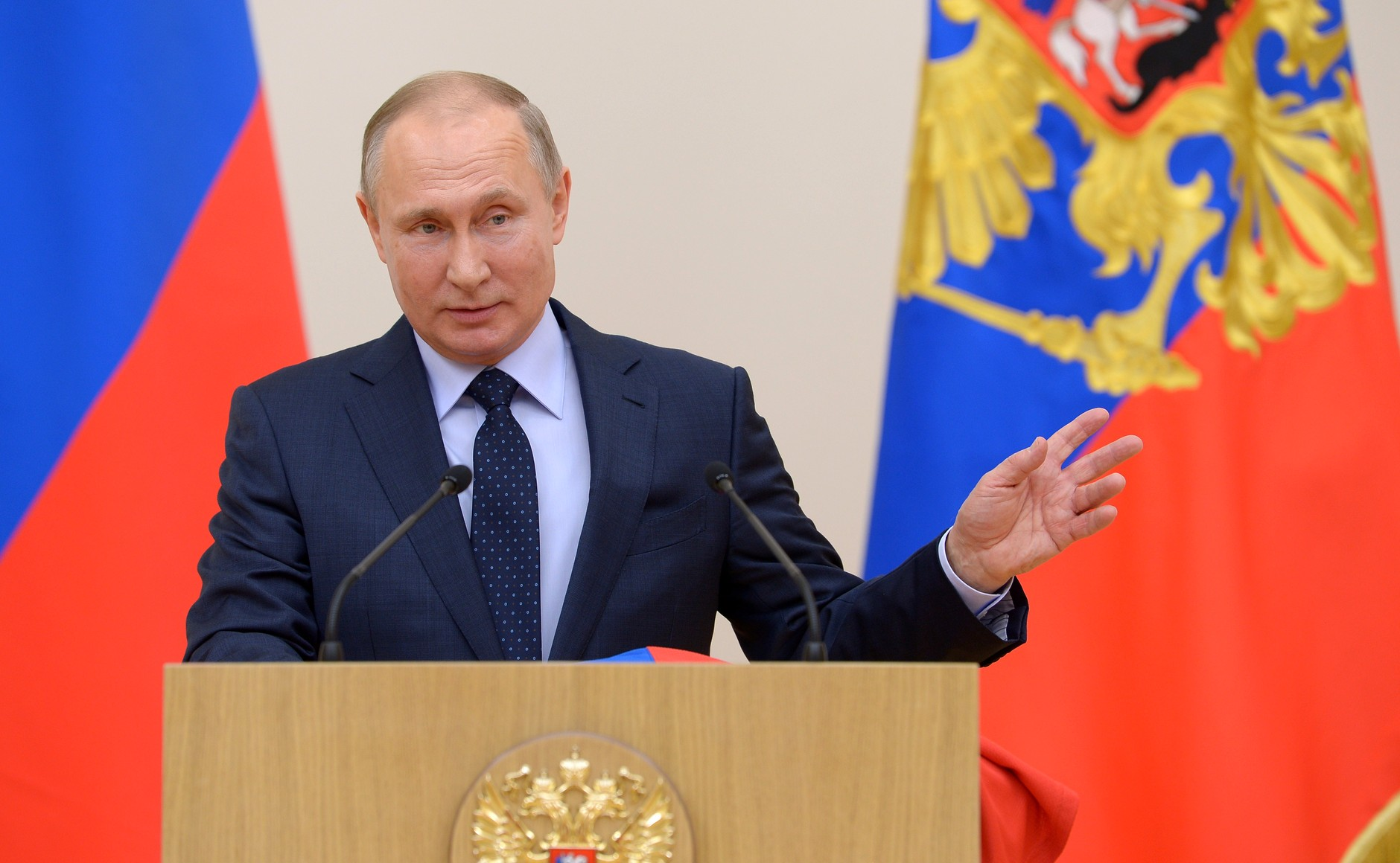 Встреча Президента России Владимира Путина с российскими спортсменами – участниками XXIII Олимпийских зимних игр 2018 года в Пхёнчхане.